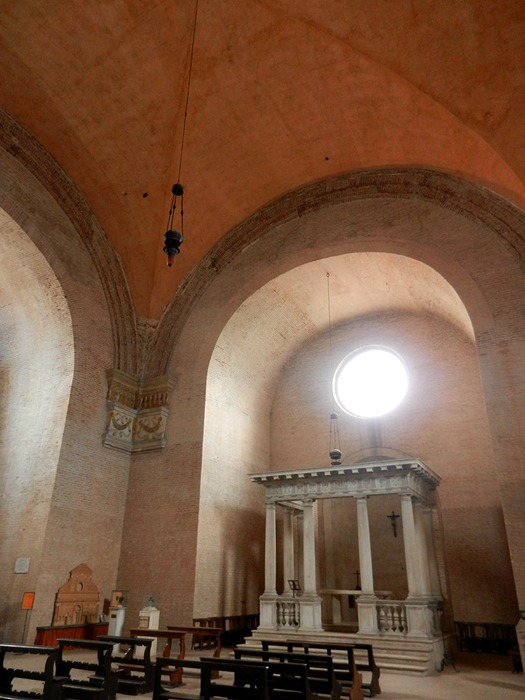 Mantova - Interno della Chiesa di S. Sebastiano